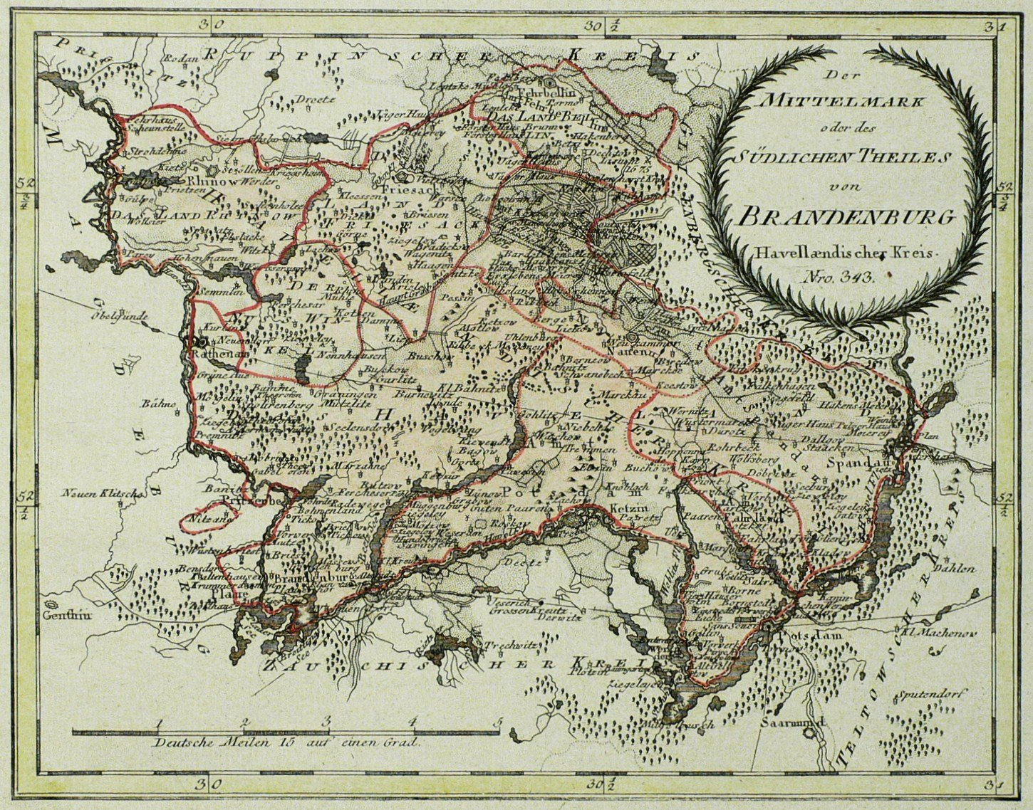 Havelland. - Mittelmark, Landkarte. Kupferstich, ankoloriert, 1791. Von Franz Johann Joseph von Reilly (Verleger, Kartograf ) und Ignaz Albrecht (Kupferstecher).